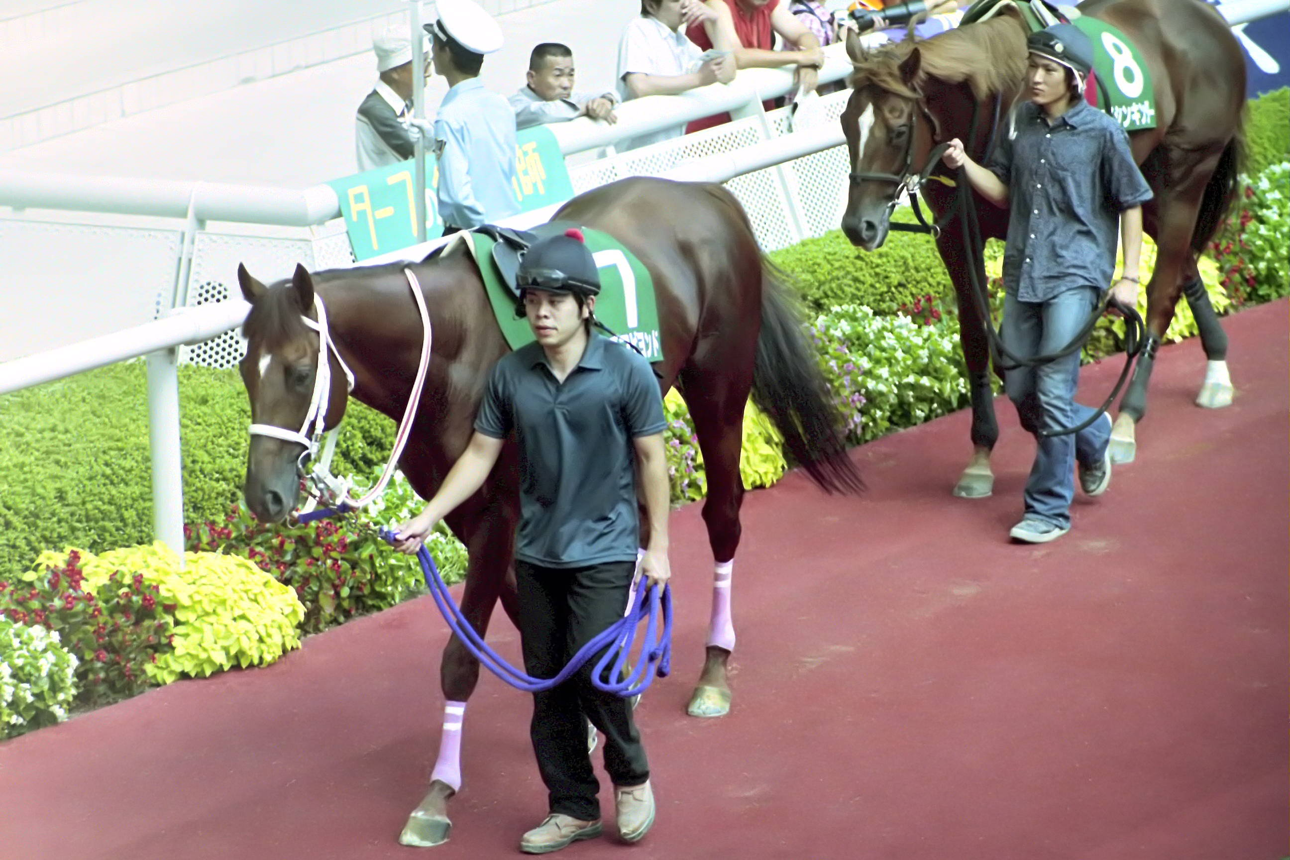 アズマビヨンド